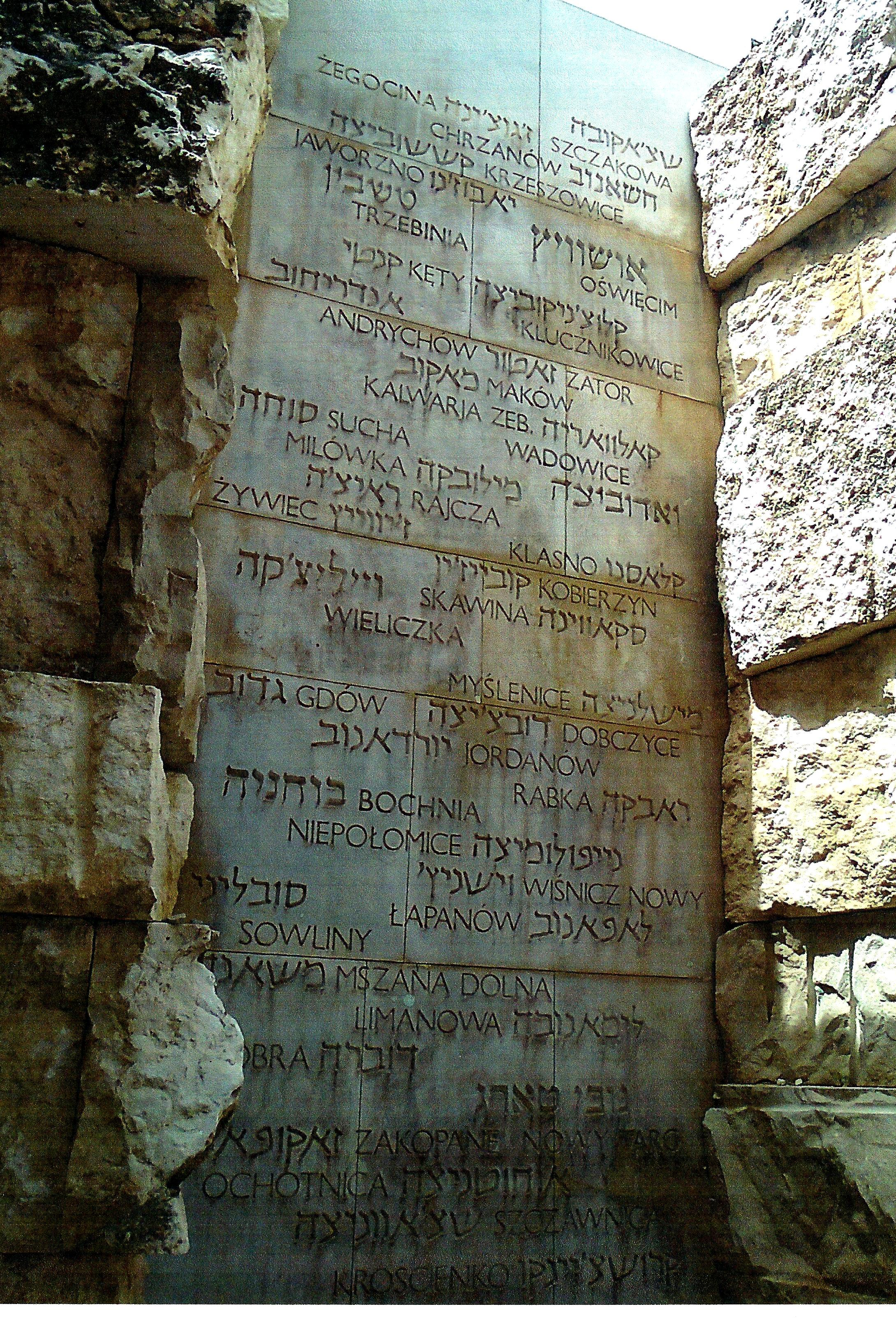 כשאנוב = בבקעת-הקהילות , ביד-ושם . ירושלים ( צילום = הולנדר 2010 ) י